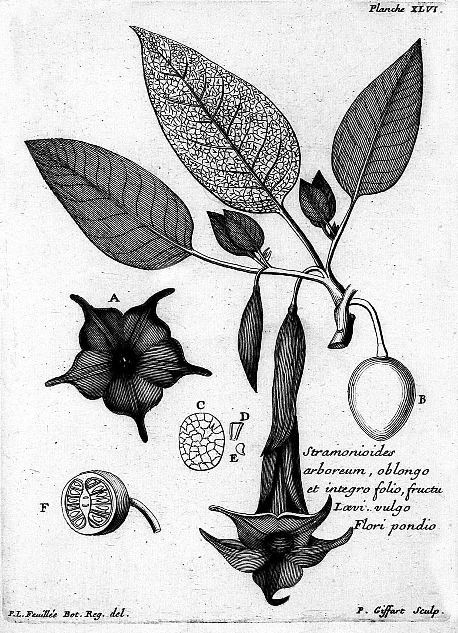 "Stramonioides arboreum oblongo et integro folio". In: "Journal des Observations Physiques, Mathematiques et Botaniques, faites par l'ordre du roy sur les côtes orientales de l'Amérique méridionale et dans les Indes occidentals depuis l'année 1707 jusques en 1712." by Louis Feuillee, (1660-1732).